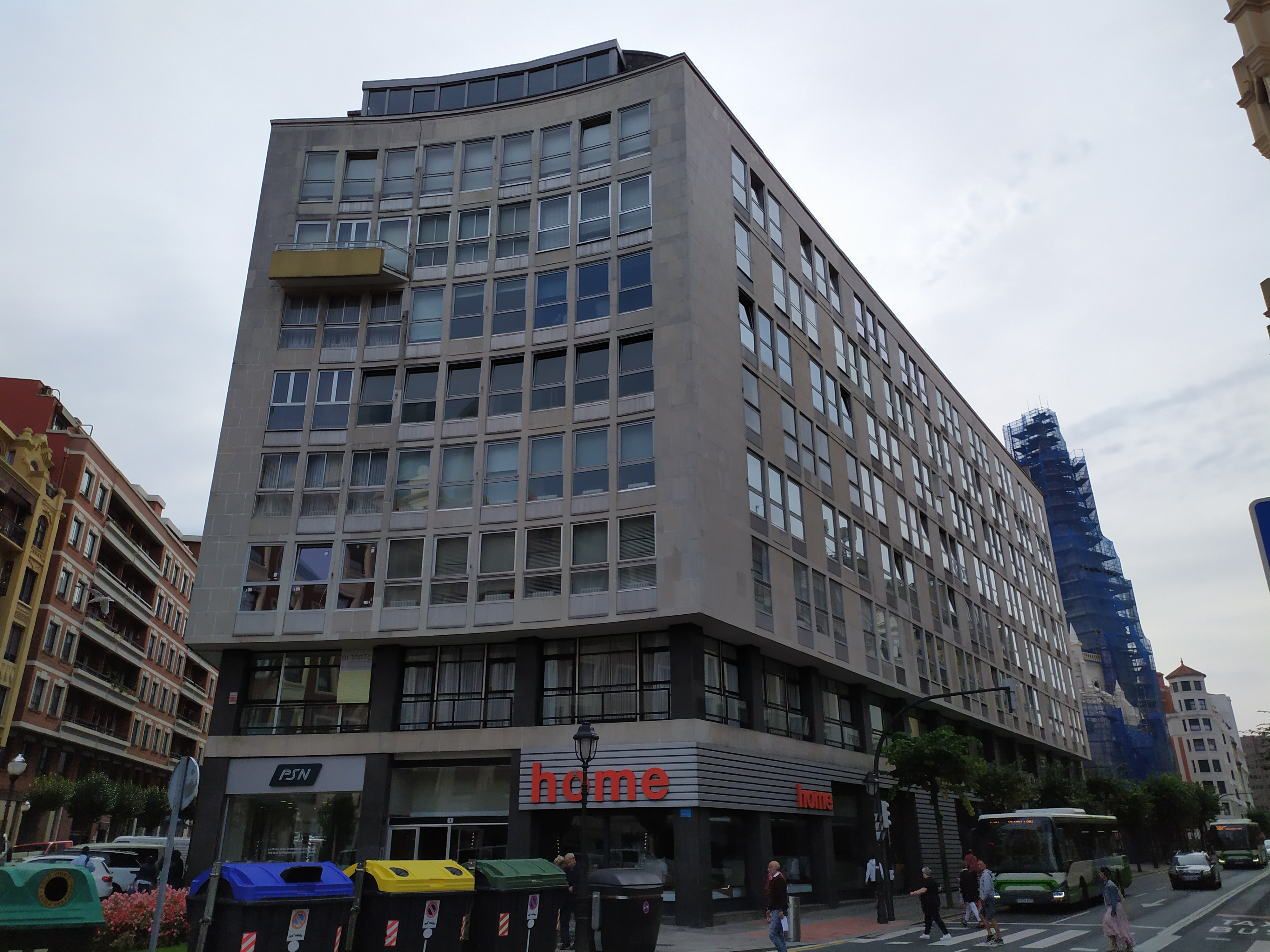 Calle Elcano 1